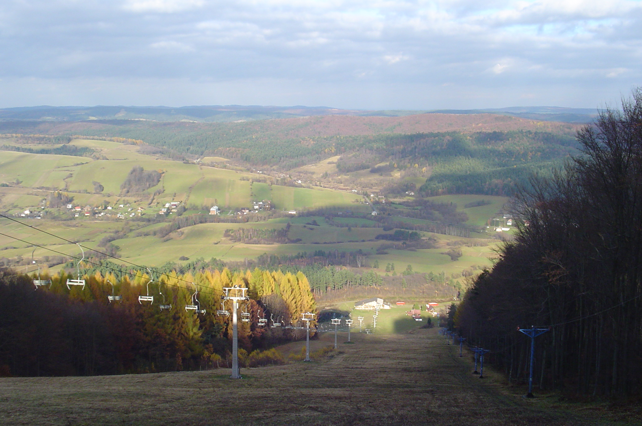 Ustrzyki Dolne, Laworta, Jesień